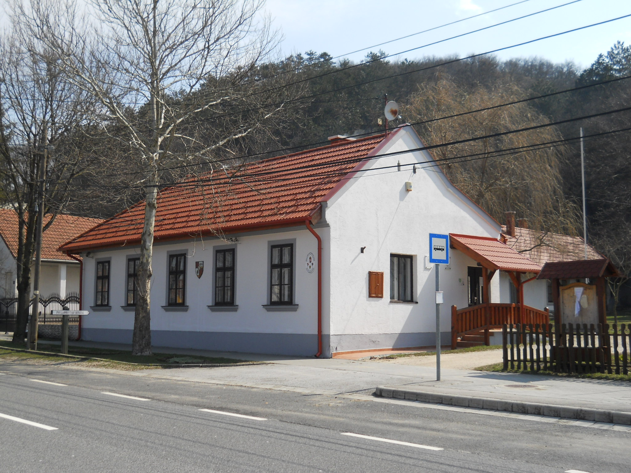 Gánt - polgármesteri hivatal